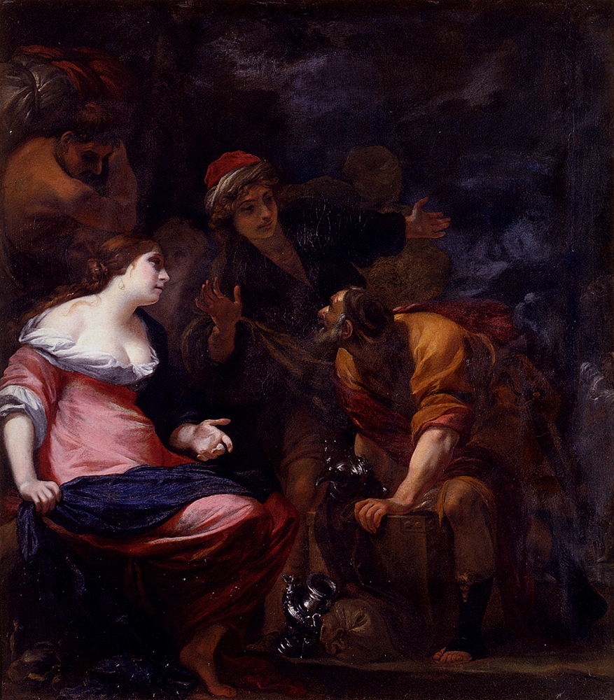 Laban busca los ídolos de la casa, Colección particular